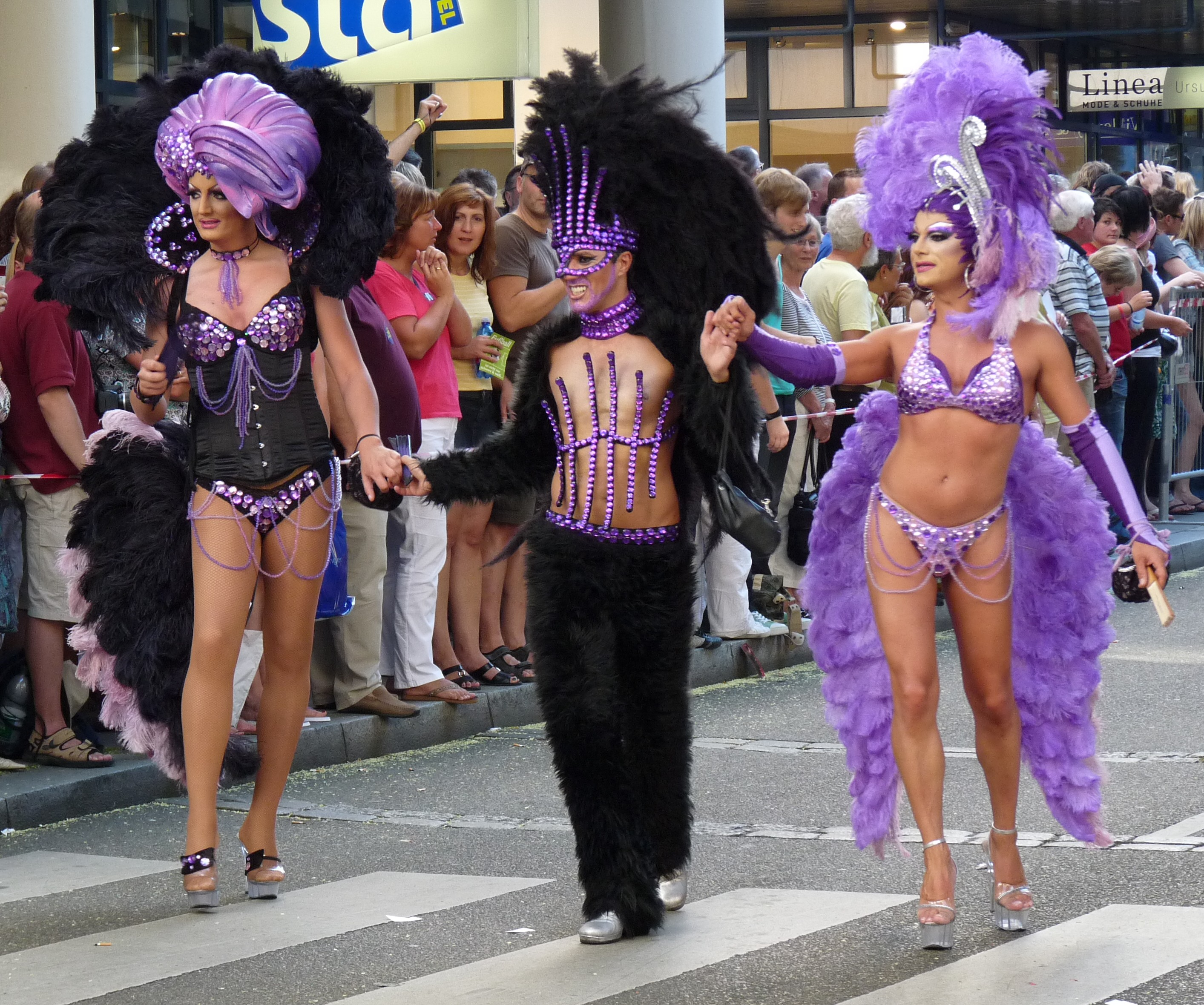 Stuttgart_-_CSD_2009_-_Parade